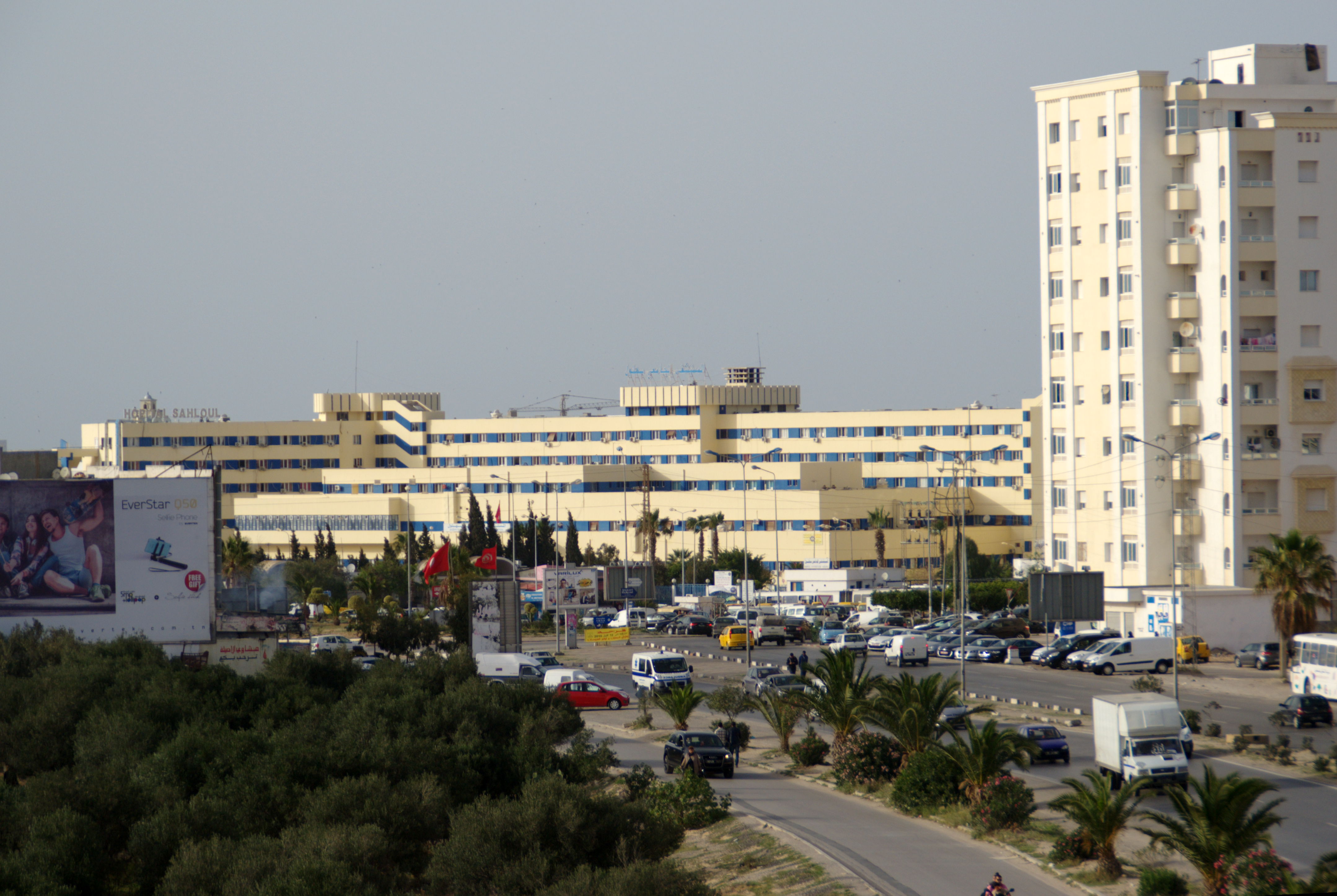 Centre hôspitalier universitaire, Sahloul à Sousse